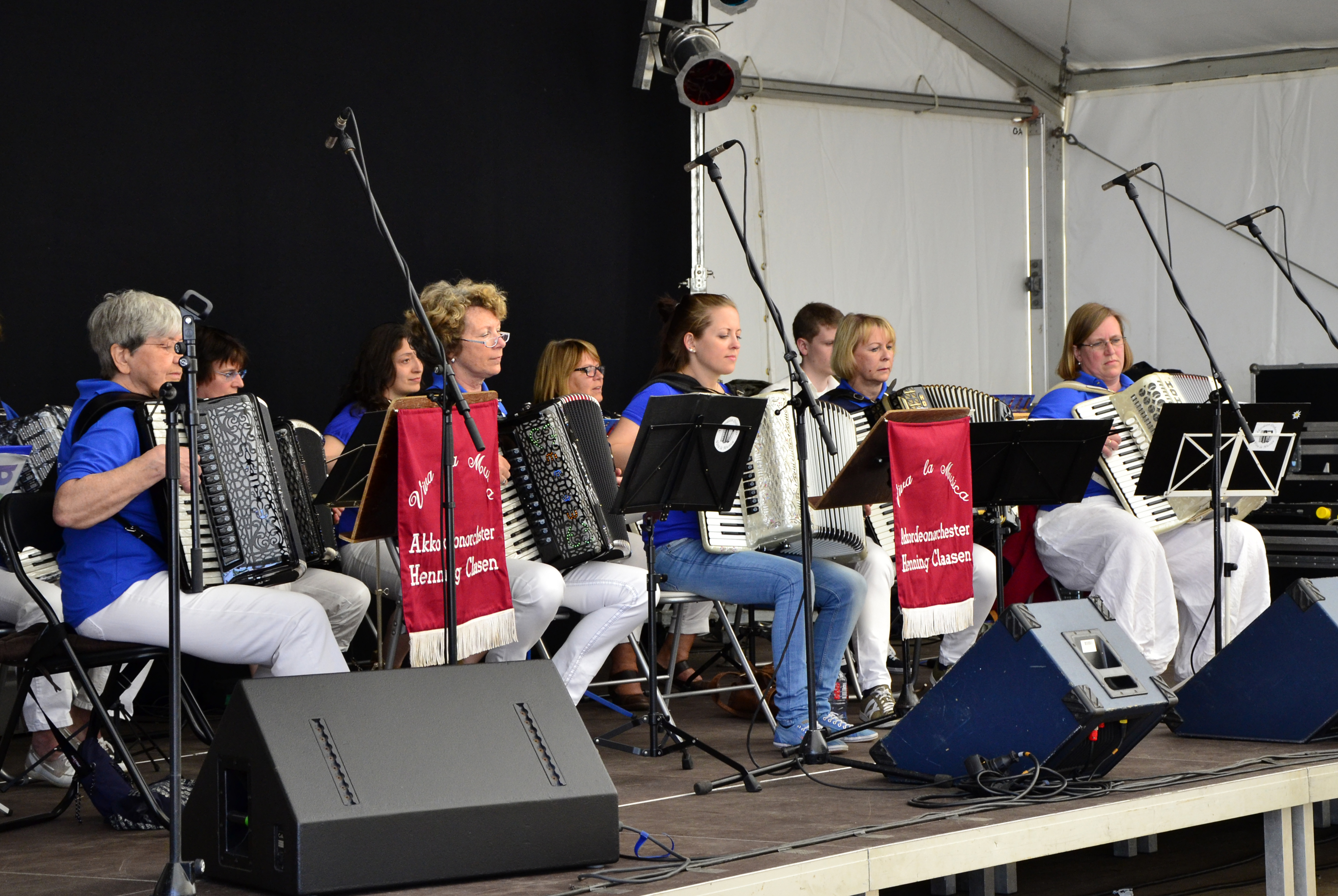 Das Akkordeonorchester Viva la Musica beim Ochsenmarkt in Wedel